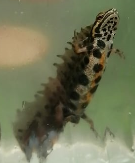 hím pettyes gőte